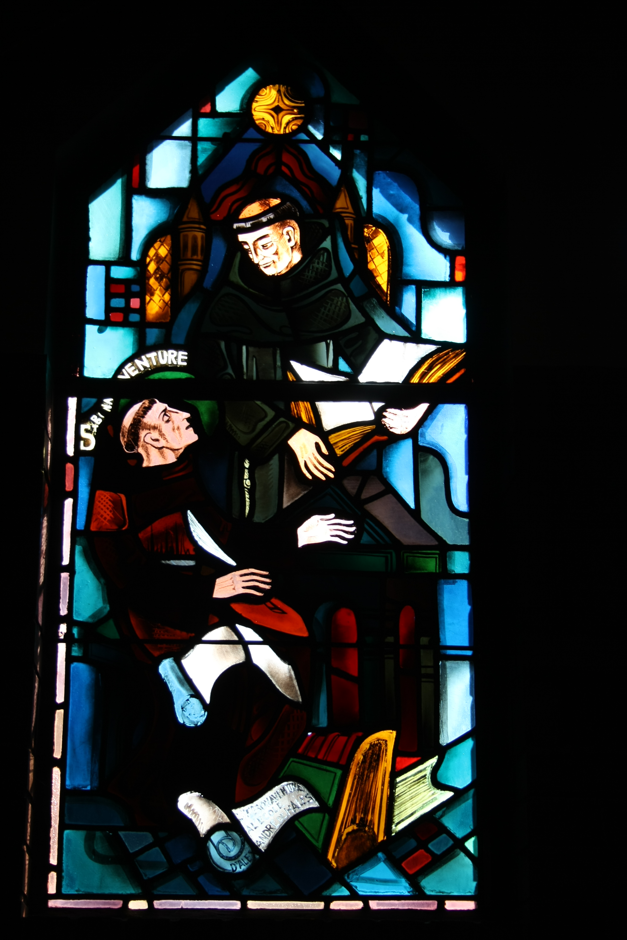 Bleiglasfenster in der Kapelle (Seitenschiff) des Couvent des Franciscains in Paris (7, rue Marie-Rose im 14. arrondissement), Darstellung: hl. Bonaventura und Alexander von Hales